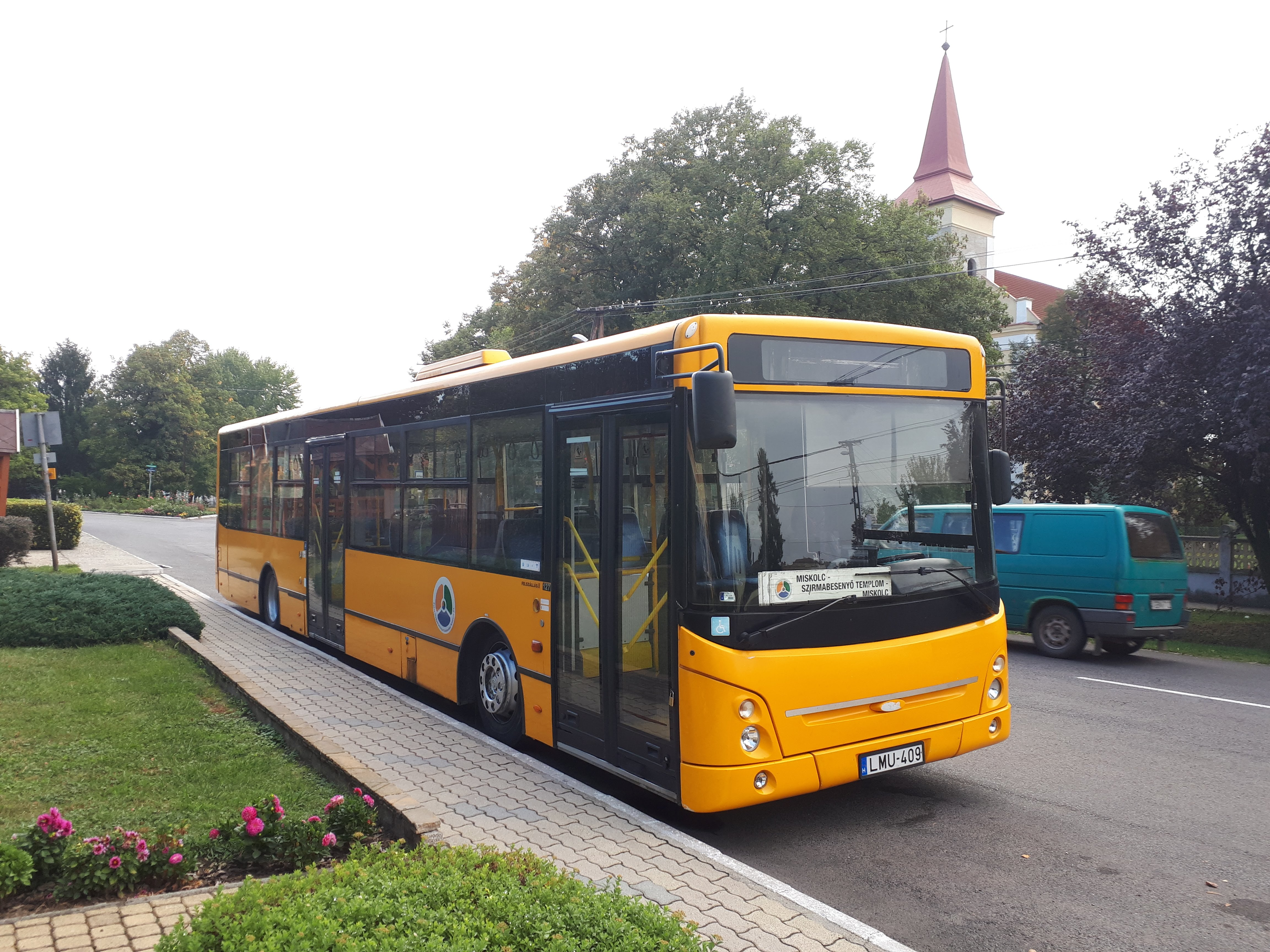 Az ÉMKK LMU-409 rendszámú Ikarus-ARC E127 típusú busza Szirmabesenyőn, a 3700-as helyközi járaton.